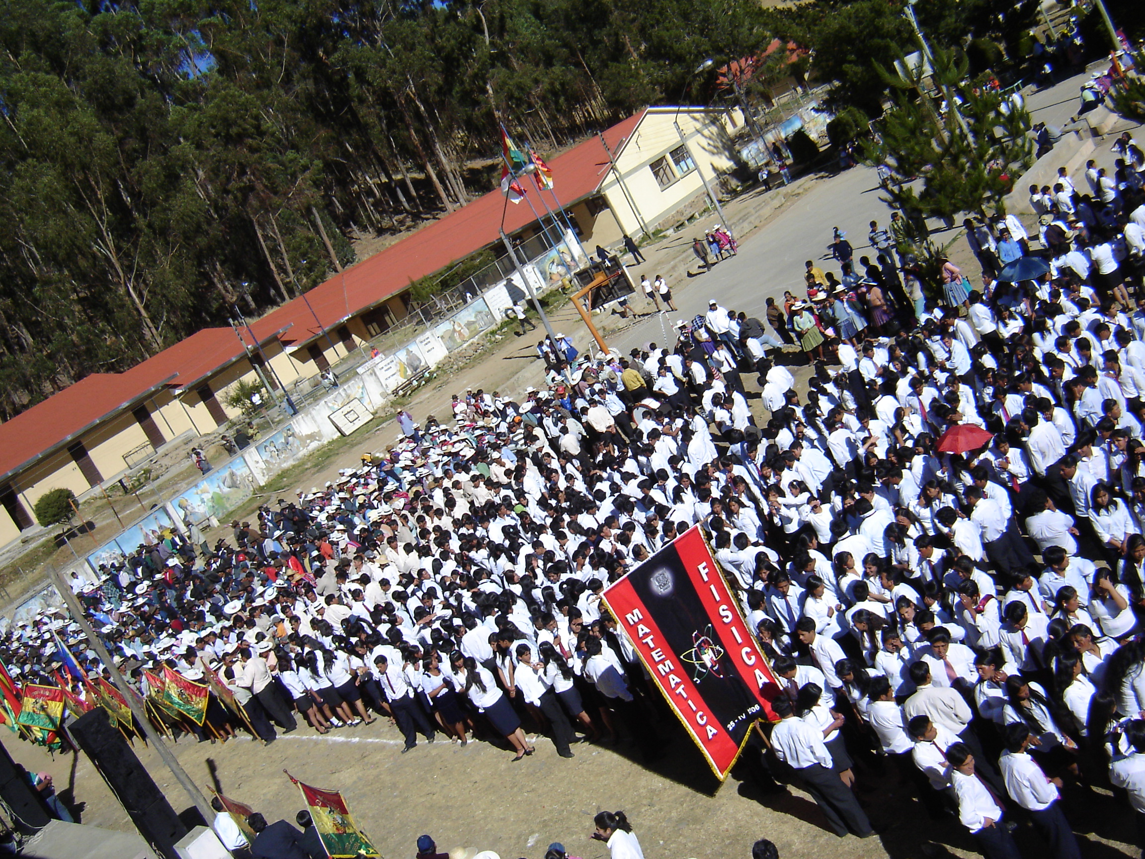 Alumnos del Instituto Normal Superior de Vacas concentrados en el patio central, durante el homenaje al Día del Campesino el 2 de agosto de 2009.